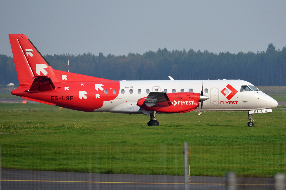 Airest, ES-LSF, Saab 340AF